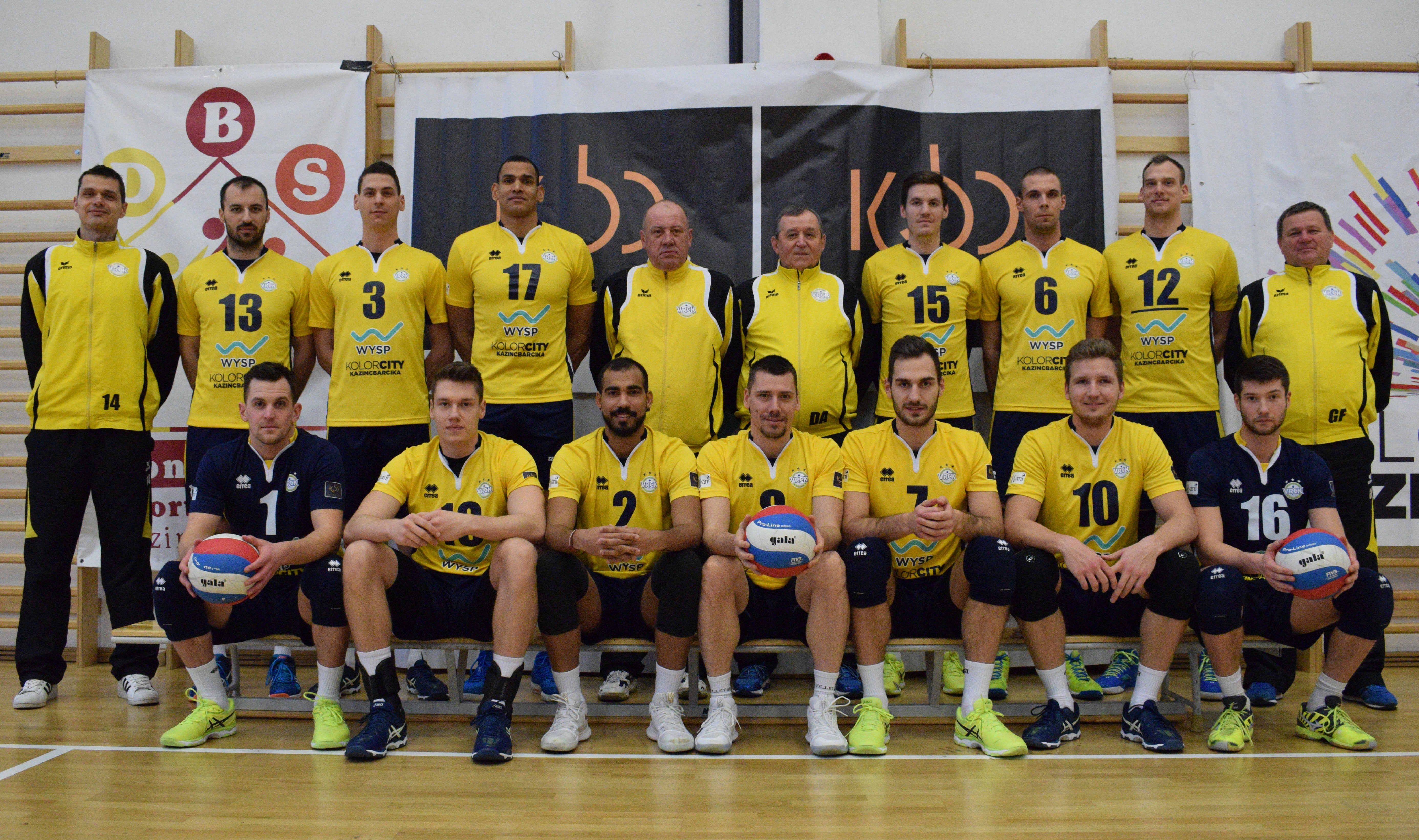 Vegyész RC Kazincbarcika csapata a 2017/2018-as idénybenFelső sor: Kovács Zoltán (statisztikus), Vlado Milev, Juhász Péter, Mészáros Dömötör, Daniel Oravec (vezetőedző), Dudás András (másodedző), Árva Milán, Kozsla Ádám, Szabó Dávid, Gulyás Ferenc (speaker)Alsó sor: Dudás Tamás, Gebhardt Norbert, Carlos Páez, Toronyai Miklós, Banai Máté, Blázsovics Péter, Gebhardt Áron